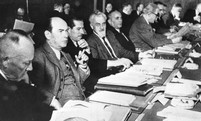 Koblenz, "Rittersturz-Konferenz" Die westdeutschen Ministerpräsidenten während ihrer Beratungen zu den "Frankfurter Dokumenten" auf dem Rittersturz bei Koblenz (8.-10. Juli 1948) v.l.n.r.: Lorenz Bock, Viktor Renner (beide Württemberg-Hohenzollern), Franz Suchan, Hermann Lüdemann, Ru Abgebildete Personen: Bock, Lorenz: Staatspräsident von Südwürttemberg-Hohenzollern, Deutschland (GND 124302181) Lüdemann, Hermann Dr.: Ministerpräsident Schleswig-Holstein, Prozeß 20. Juli 1944, Deutschland Kopf, Hinrich Wilhelm Dr.: Ministerpräsident von Niedersachsen, Bundesrepublik Deutschland Katz, Rudolf: 1895-1961; Jurist, Justizminister von Schleswig-Holstein, Verfassungsrichter, Deutschland